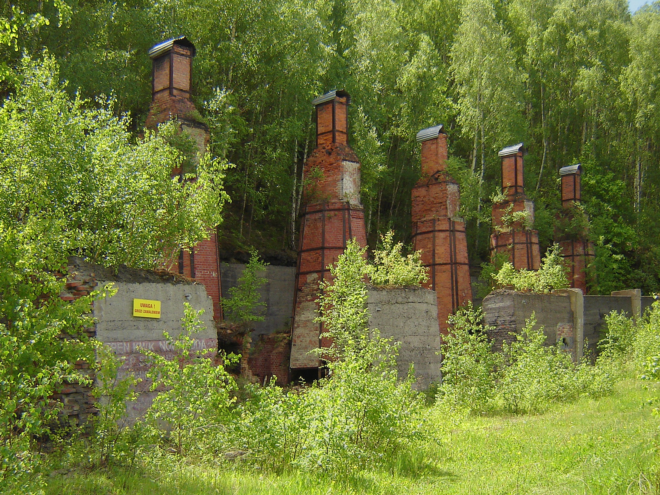 Nowa Ruda, teren d. KWK "Nowa Ruda" - bateria 5 pieców szybowych na terenie nieczynnej prażalni łupku ogniotrwałego - Pole Piast (28-32), 1898-99 (zabytek nr A/952/1424/WŁ z 6.02.1995)